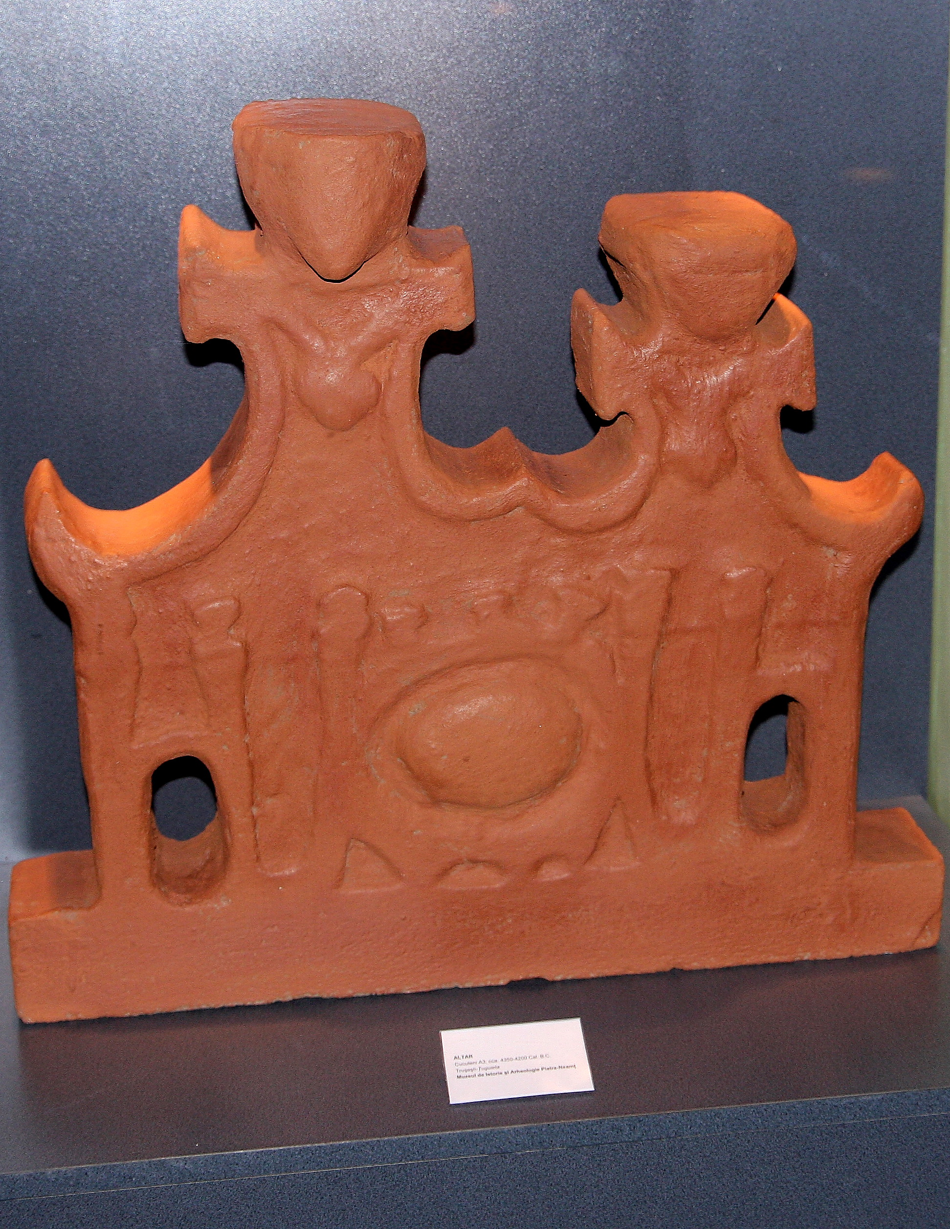 Cucuteni Shrine